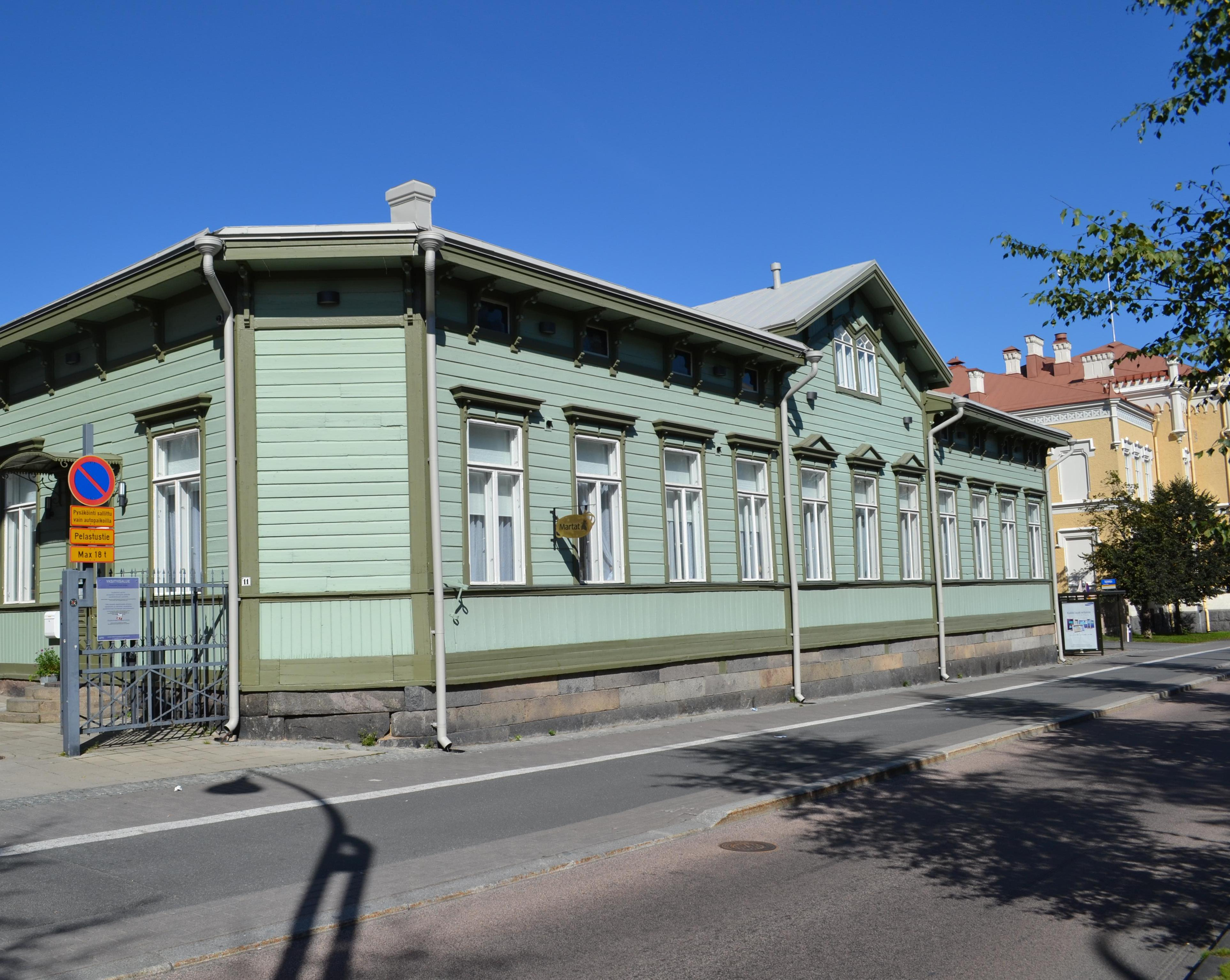 Vuonna 1863 valmistunut puutalo Jyväskylän keskustassa